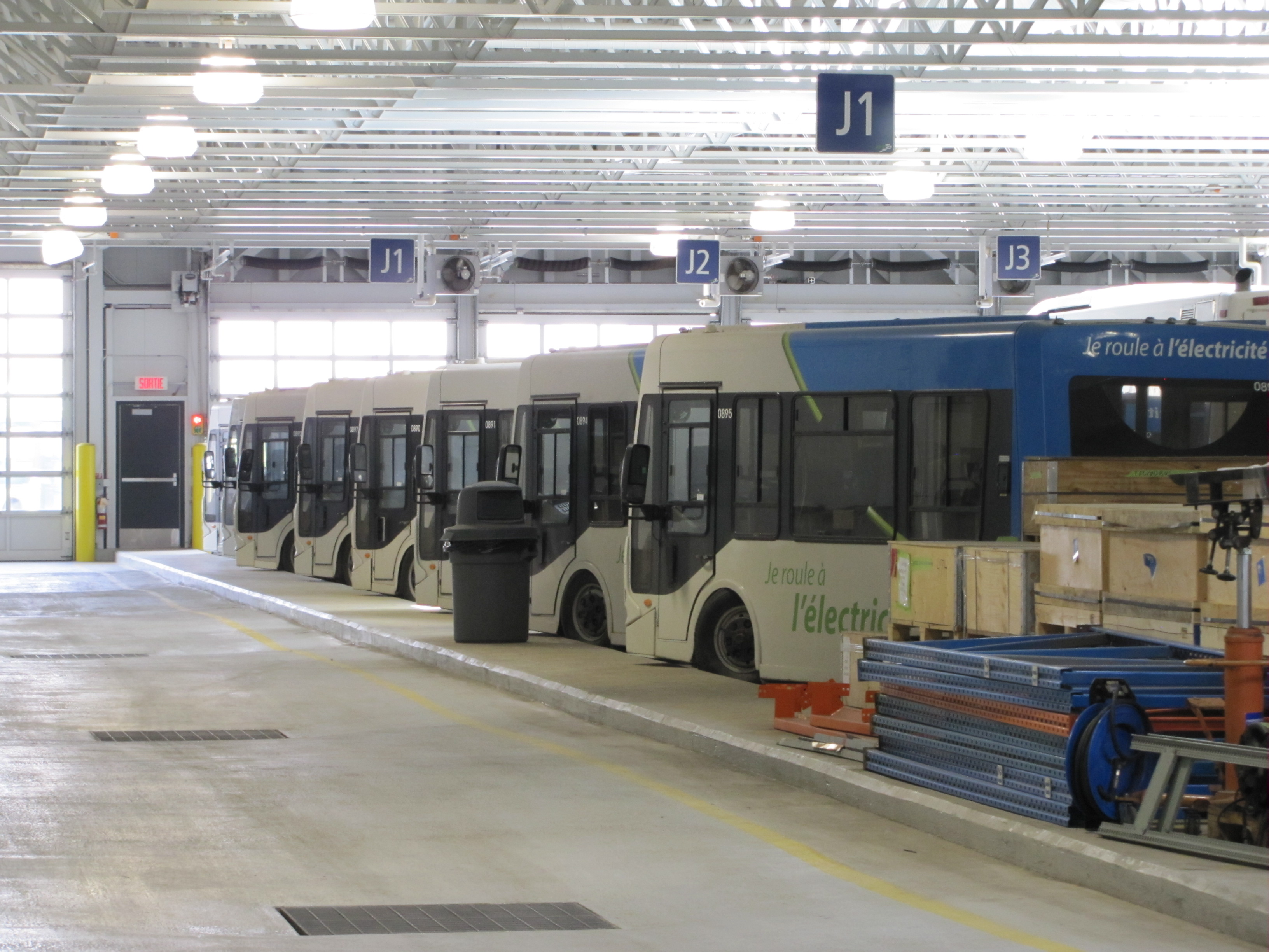 Les 8 Écolobus du Réseau de transport de la Capitale, quelques mois après leur retrait de la circulation. Les véhicules sont conservés au Centre Métrobus en attendant de trouver un acquéreur.